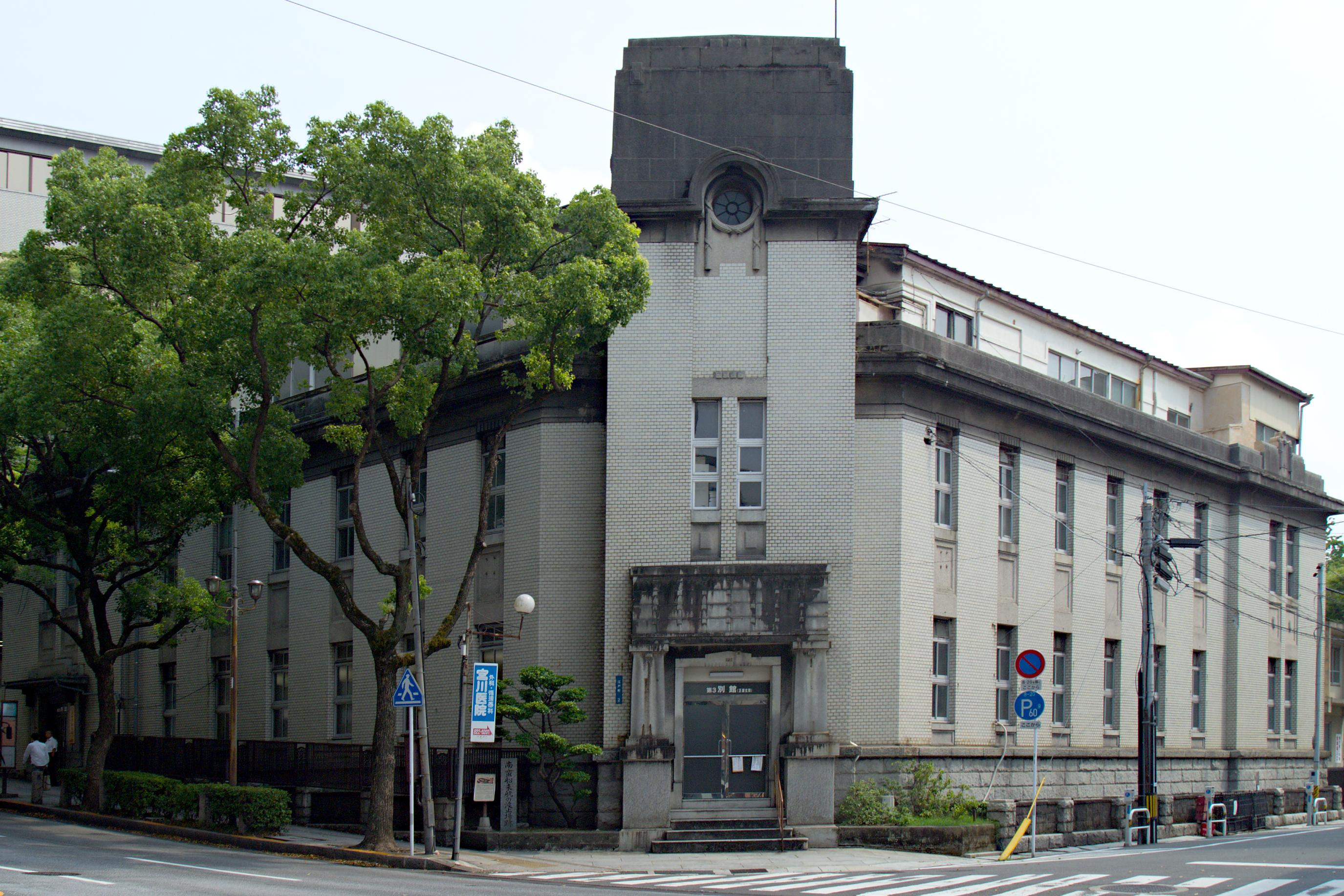 旧長崎警察署庁舎。現在は長崎県庁第三別館（長崎県長崎市）。